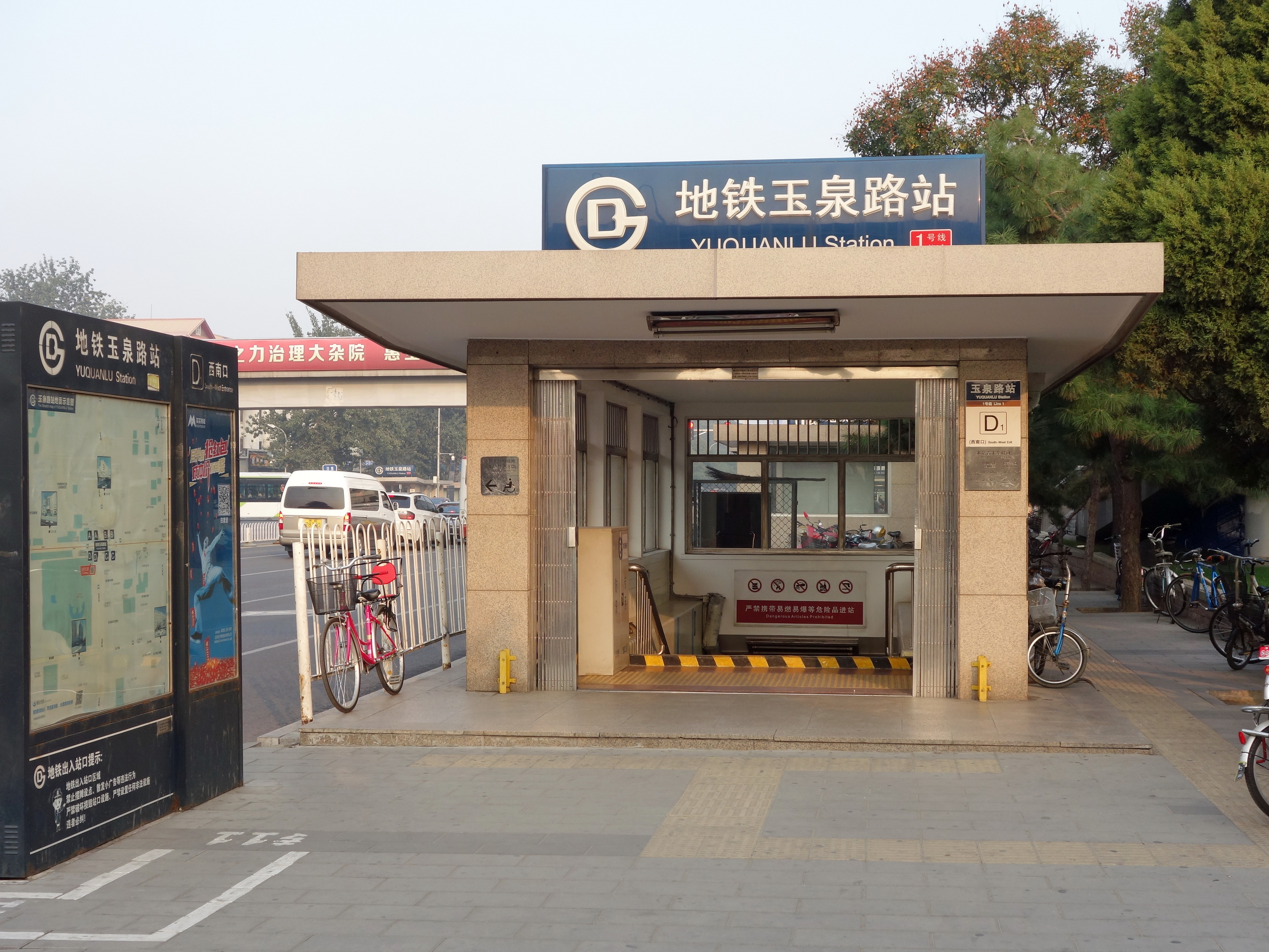 北京地铁1号线玉泉路站西南 (D1) 口